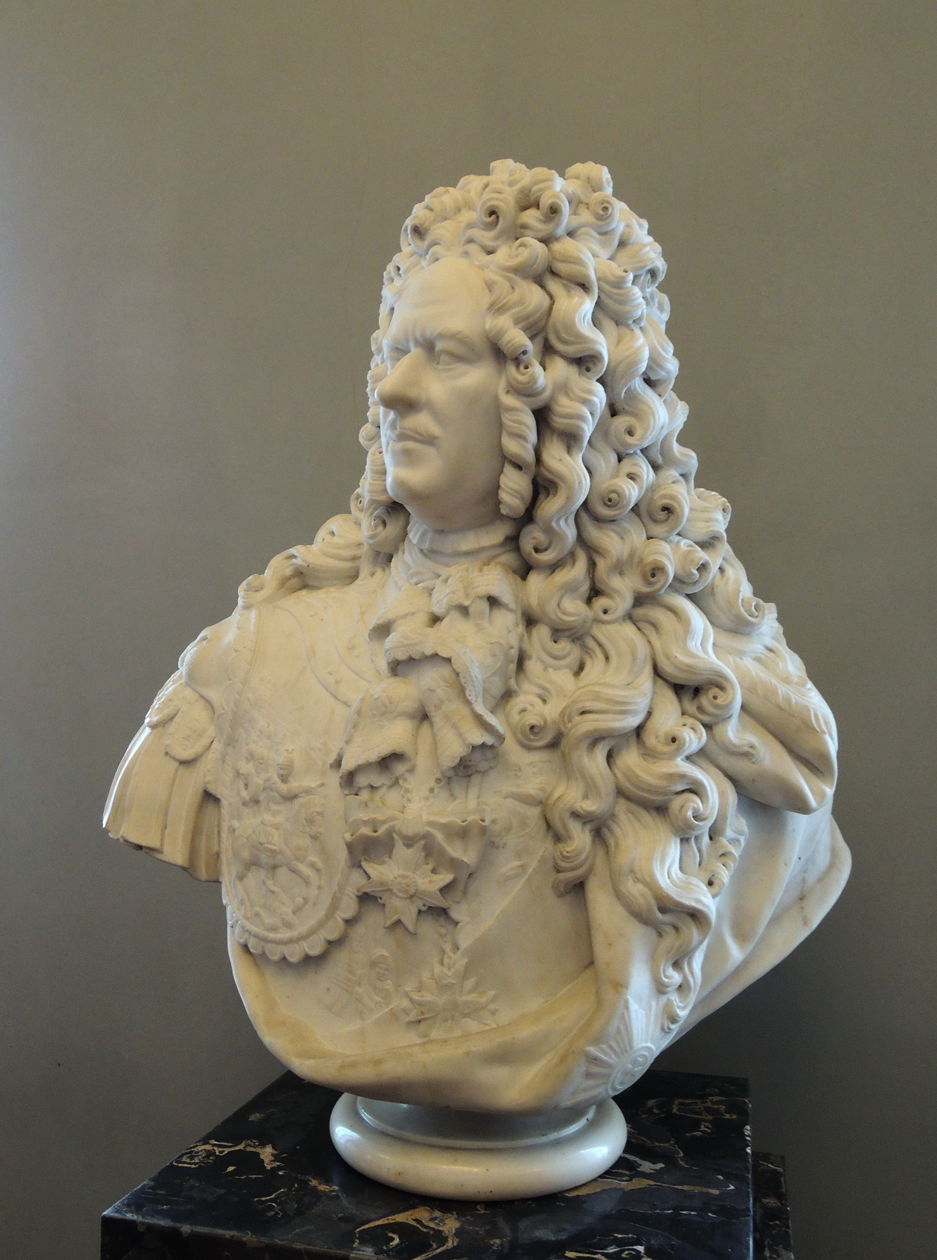 Карло Растрелли. «Портрет Александра Меншикова», мраморный вариант работы Ивана Витали с бронзового оригинала 1717 года. ГРМ